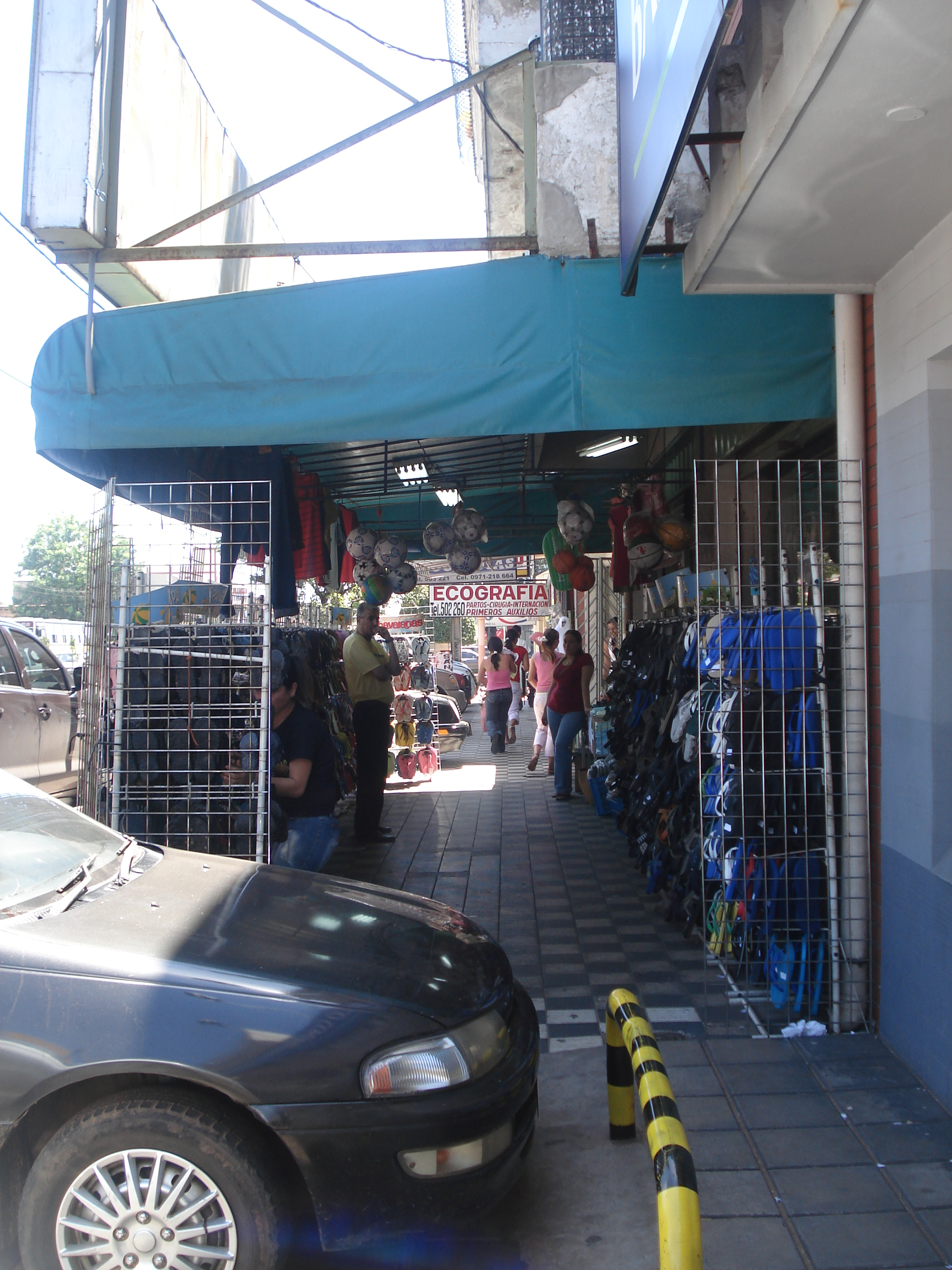 Zona Comercial de Fernando de la Mora